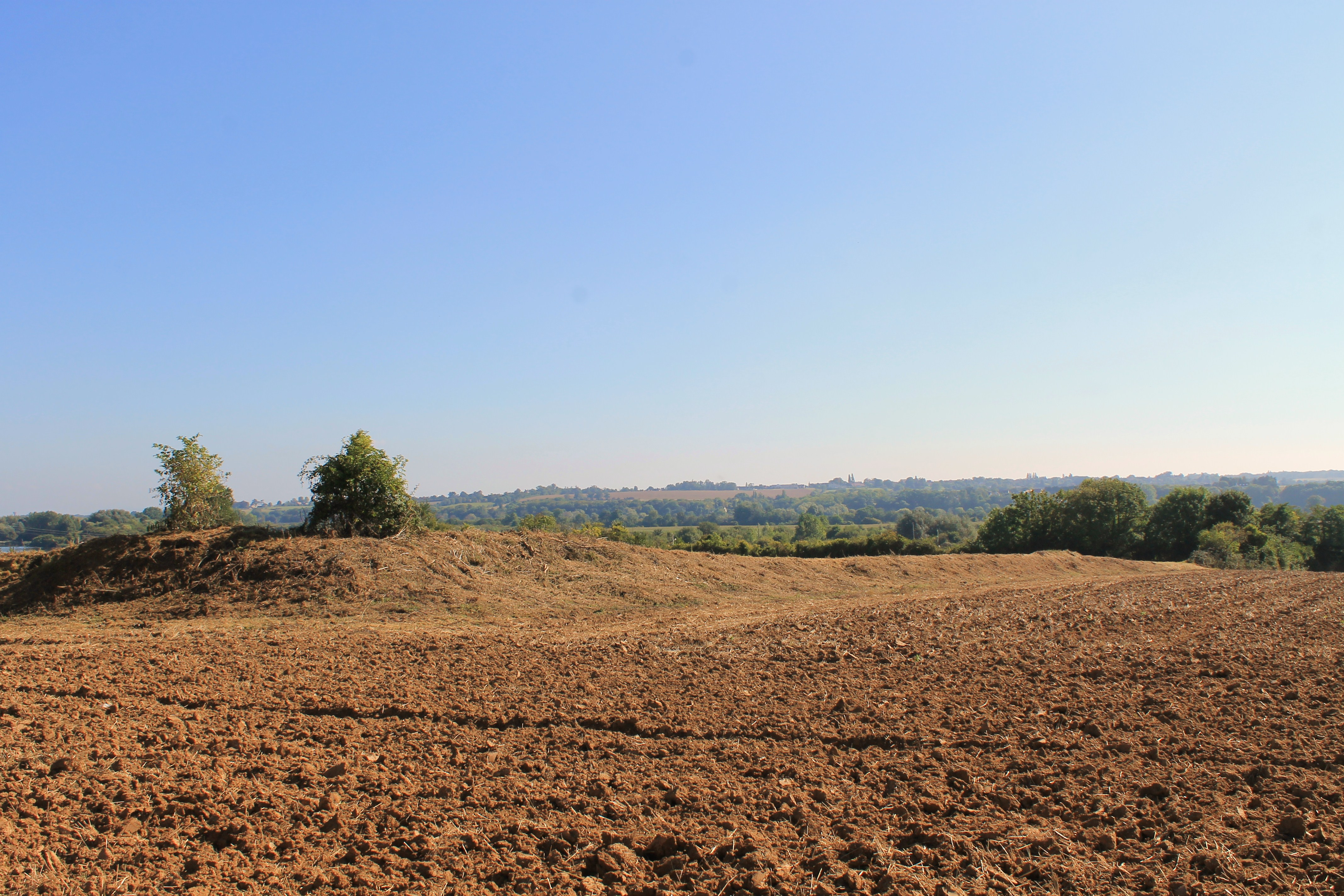 Тоҷикӣ: Camp romain du Catillon (vestiges du rempart nord-ouest) sur la rive gauche de l'Orne entre Ouistreham et Bénouville (Calvados)